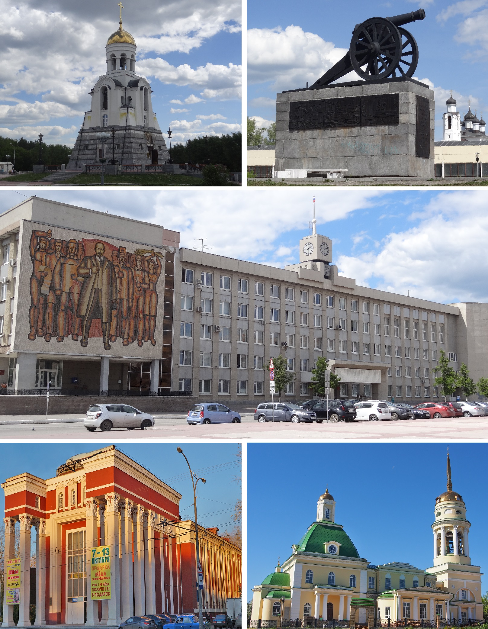 По часовой стрелке: Часовня Александра Невского, памятник пушке, здание городской администрации, Свято-Троицкий собор, дворец культуры УАЗа Edited version of File:Cannon monument in Kamensk-Uralsky.jpg, File:Свято-Троицкий собор (улица Ленина, 126).jpg, File:Chapel of Alexander Nevsky (Kamensk-Uralsky).jpg, File:Building administration Kamensk-Uralsky.jpg, File:Дворец культуры Уральского алюминиевого завода.jpg